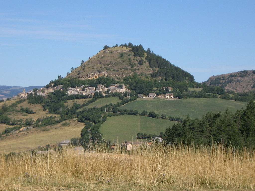 Truc de Grèzes (Lozère)